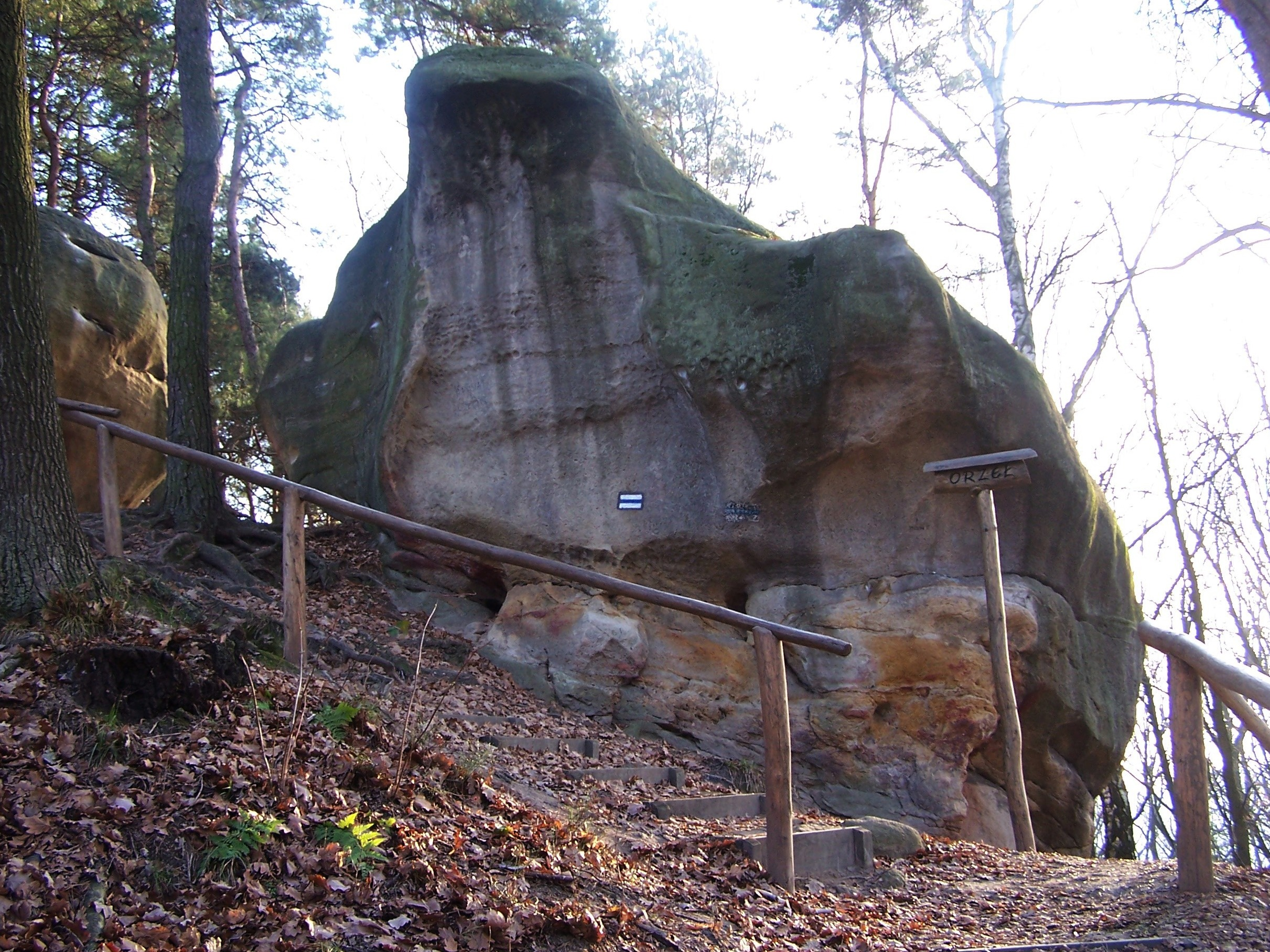 Ostaniec skalny Orzeł w Skamieniałym Mieście w Ciężkowicach